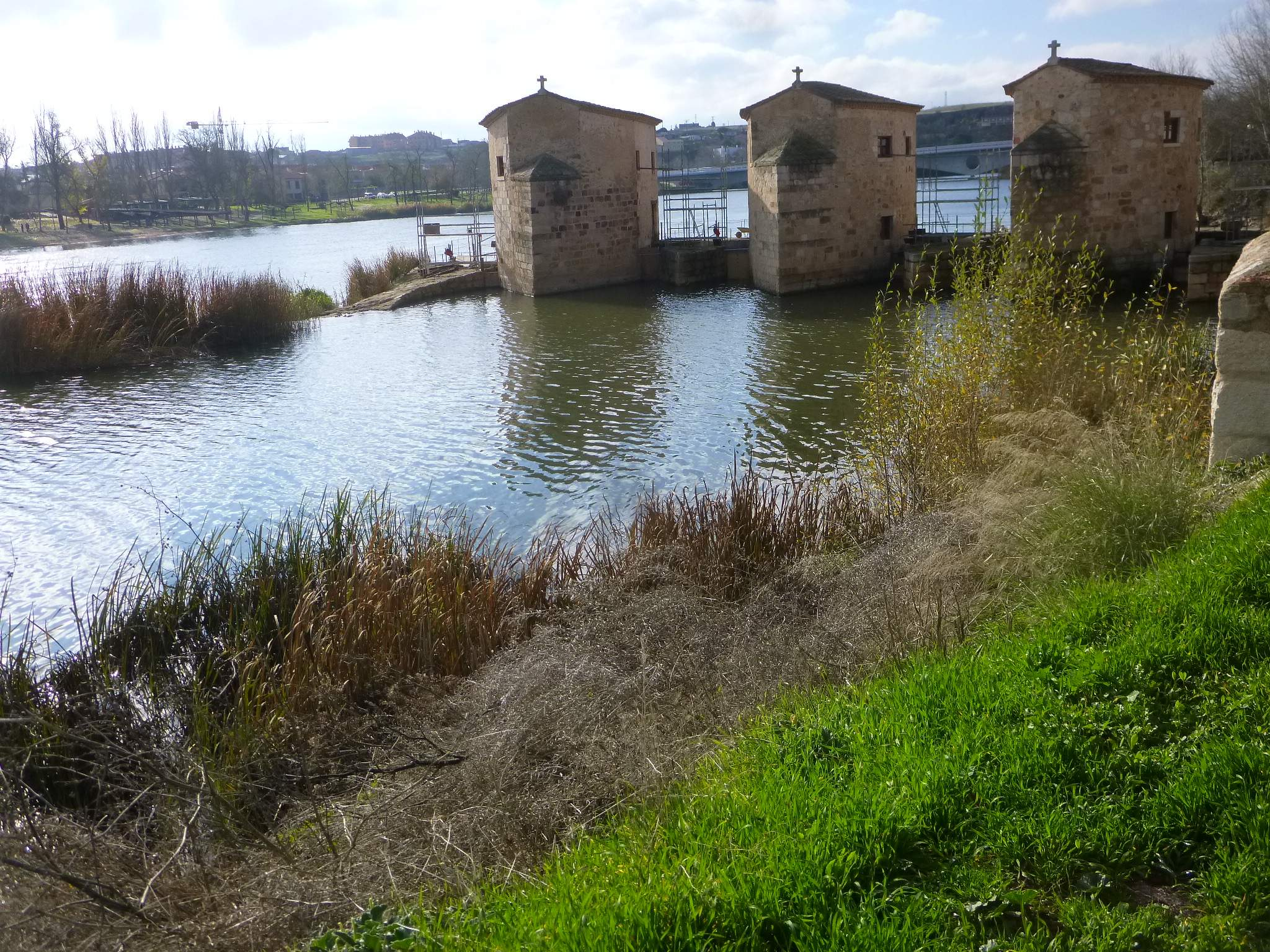 Zamora - Aceñas de Olivares